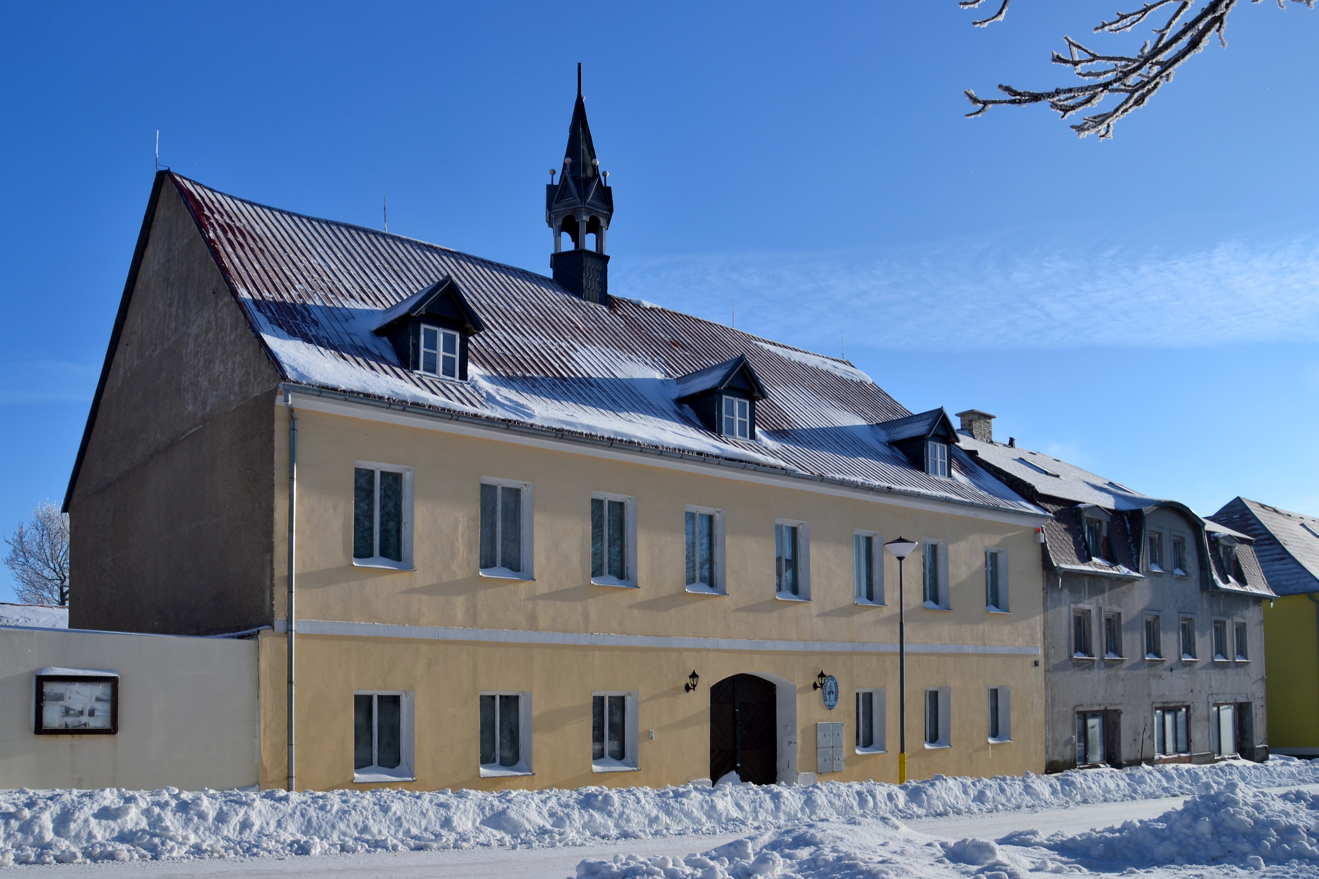 Radnice (Měděnec), Měděnec 11